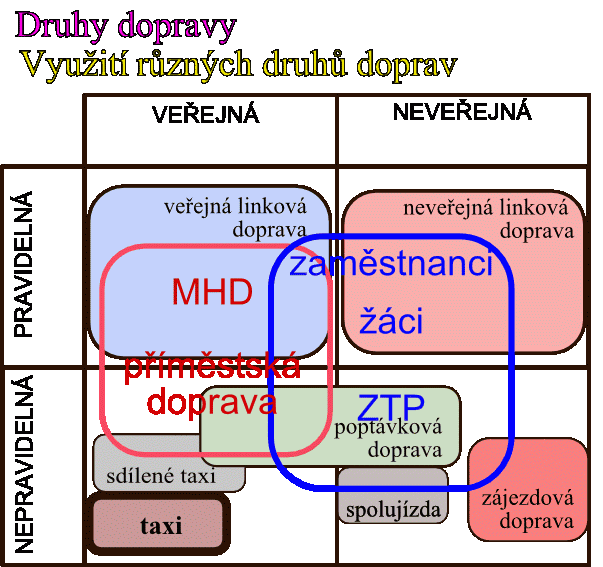 vymezení taxi mezi druhy dopravy